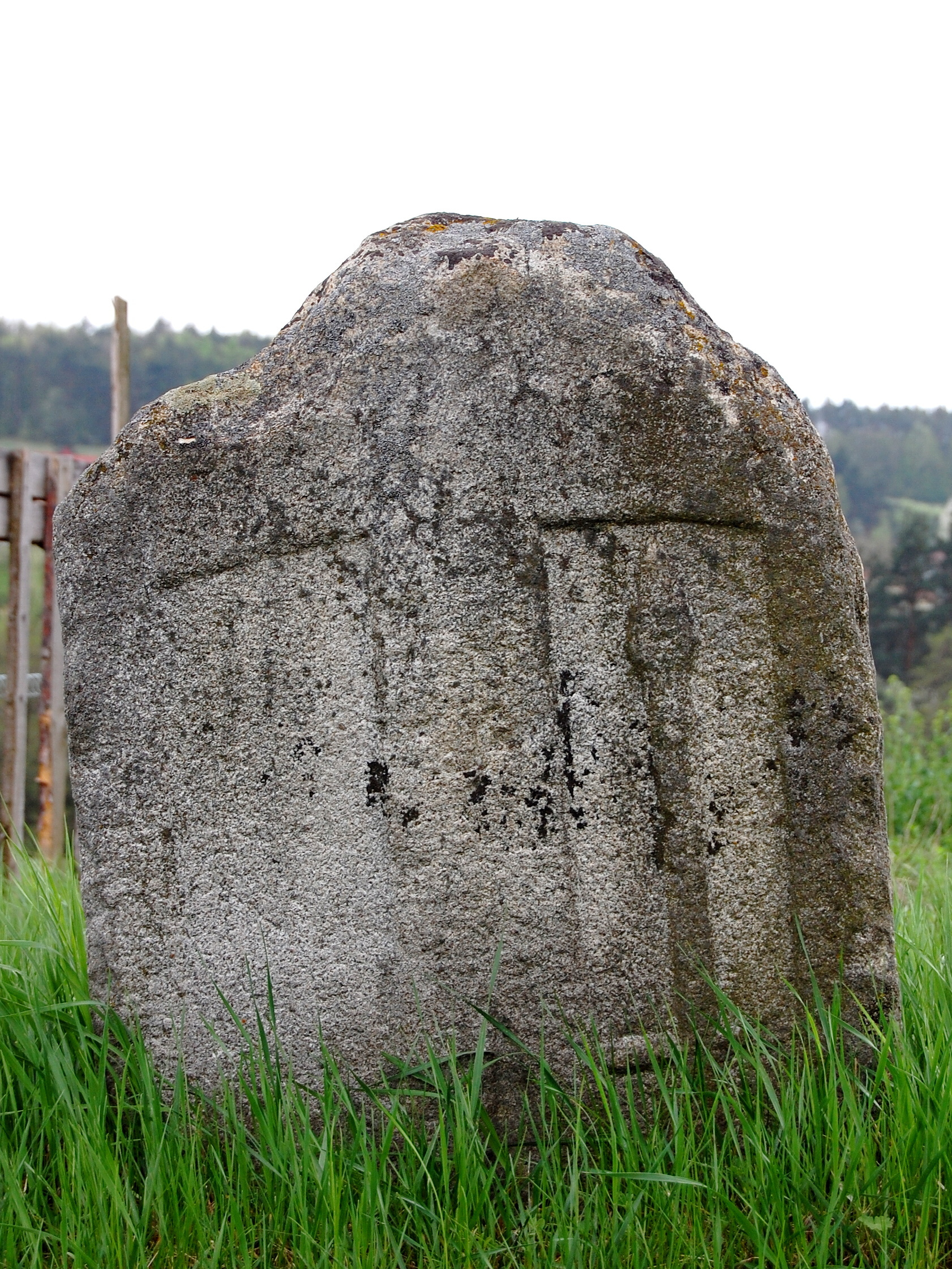 Smírčí kámen (Hluboké Mašůvky), při silnici do Bojanovic, Hluboké Mašůvky